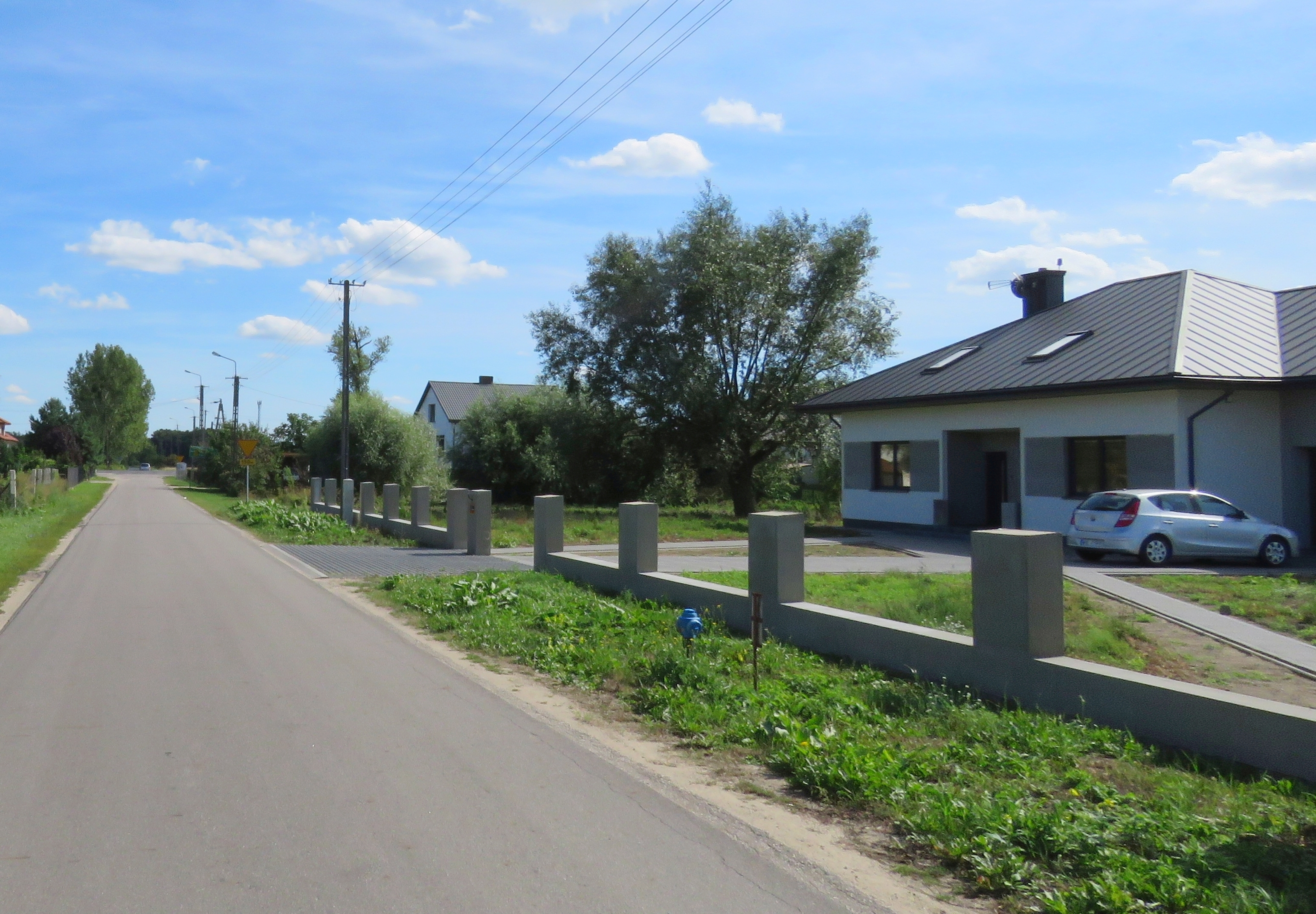 GNIEWNIEWICE FOLWARCZE